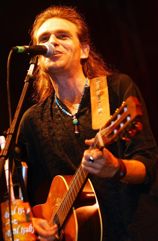 Gaya